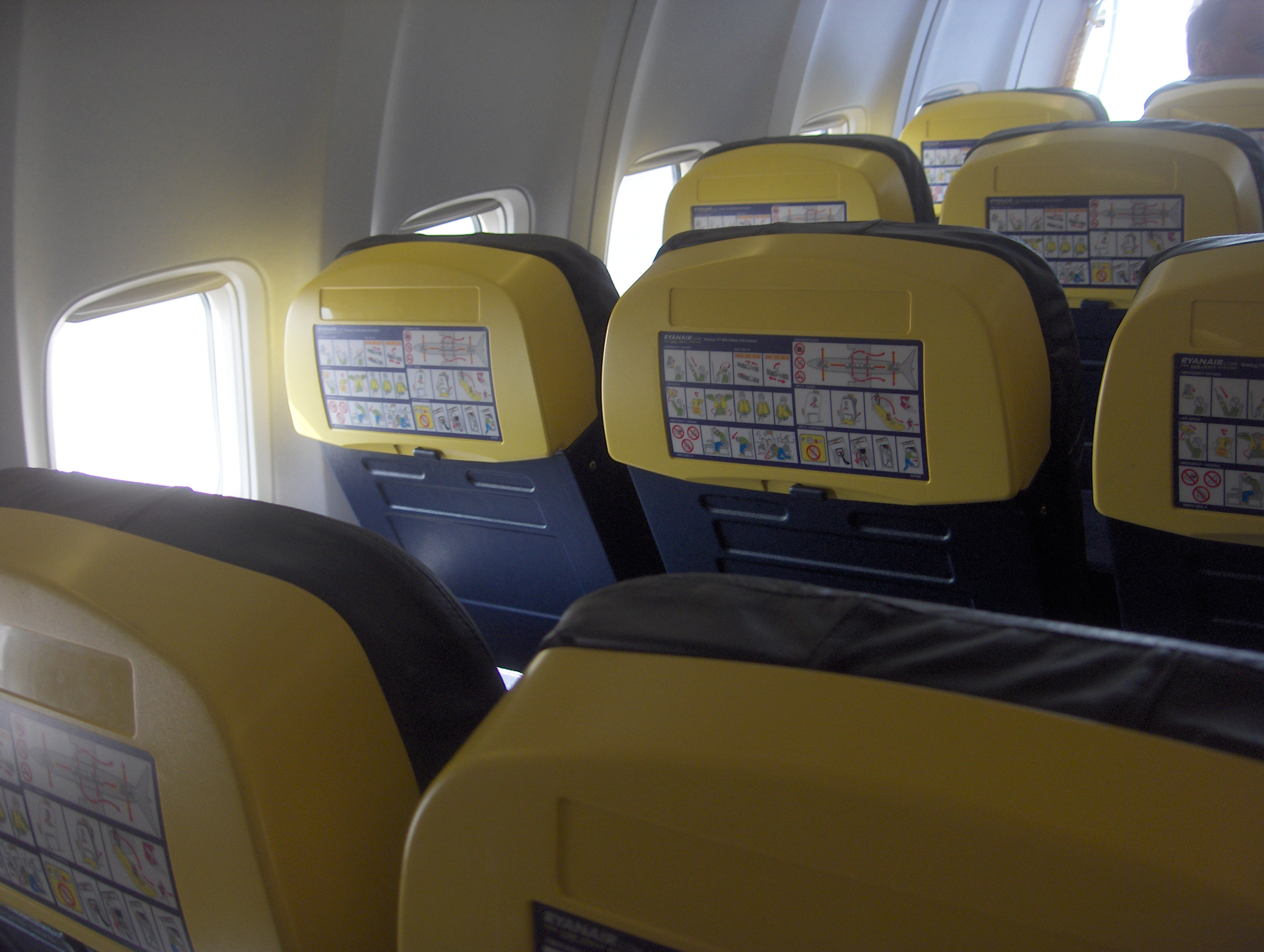 Inside a Ryanair plane